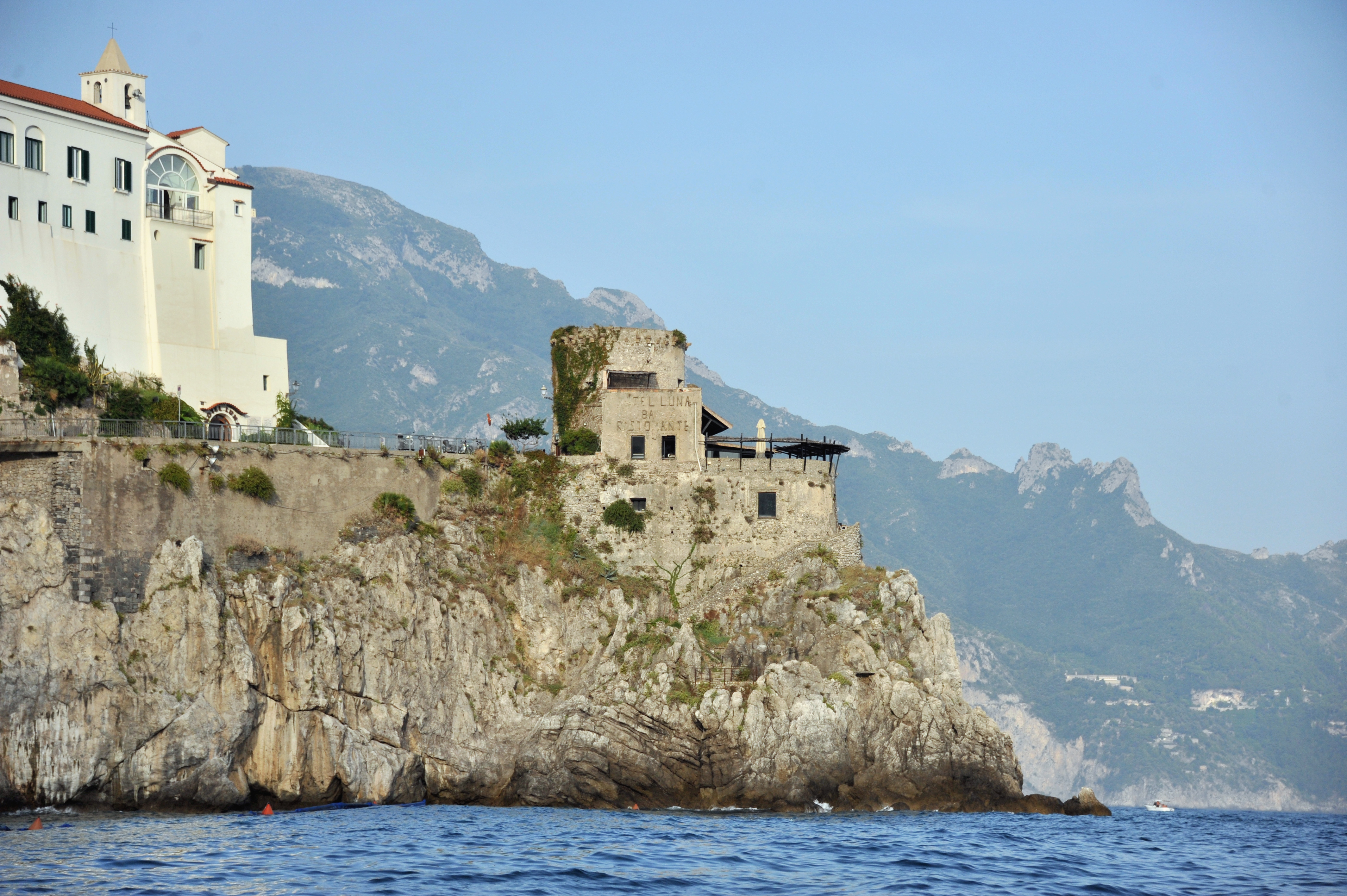 Torrione di San Francesco (Torre Hotel Luna) This is a photo of a monument which is part of cultural heritage of Italy.